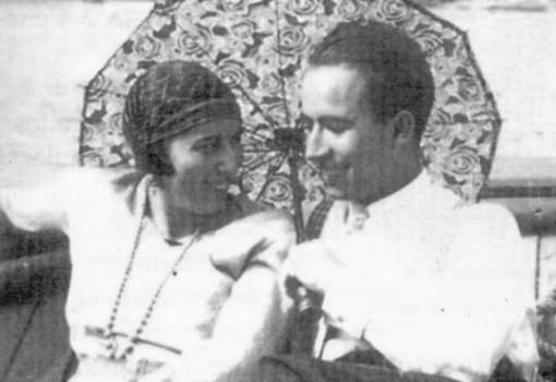 Amalia Álvarez Gallego (1906-2001) e Alexandre Bóveda (1903-1936)